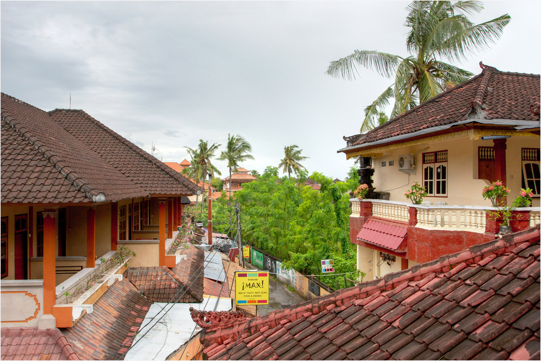 Kuta Bali on Nyepi Day